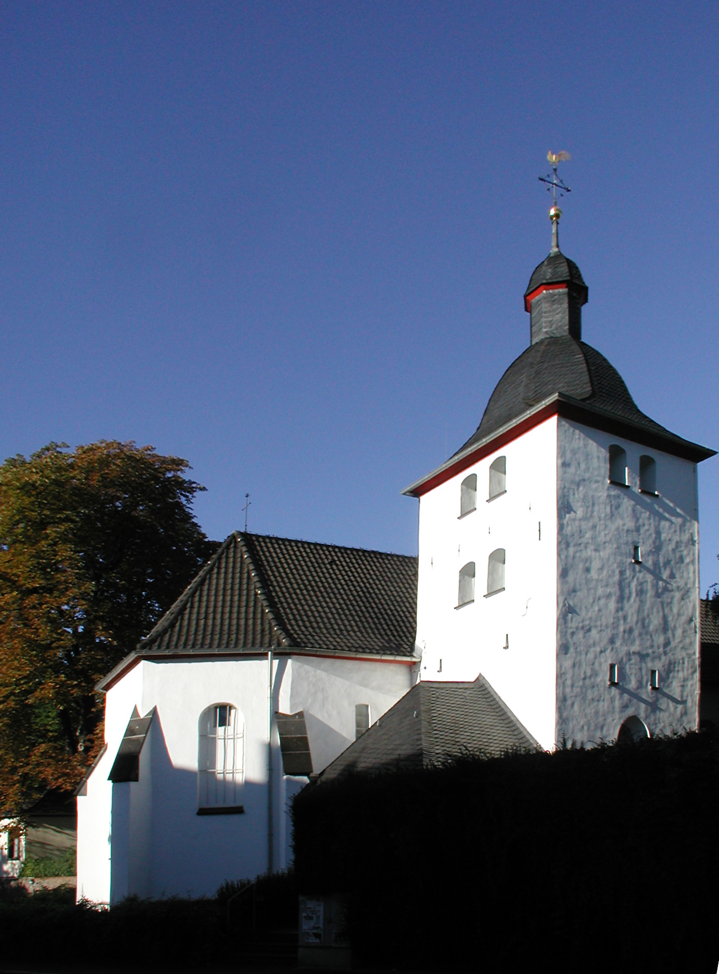 Hürth - Alt-Hürth, alte Katholische Pfarrkirche St. Katharina